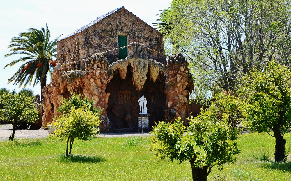 Parc Samà (Cambrils)